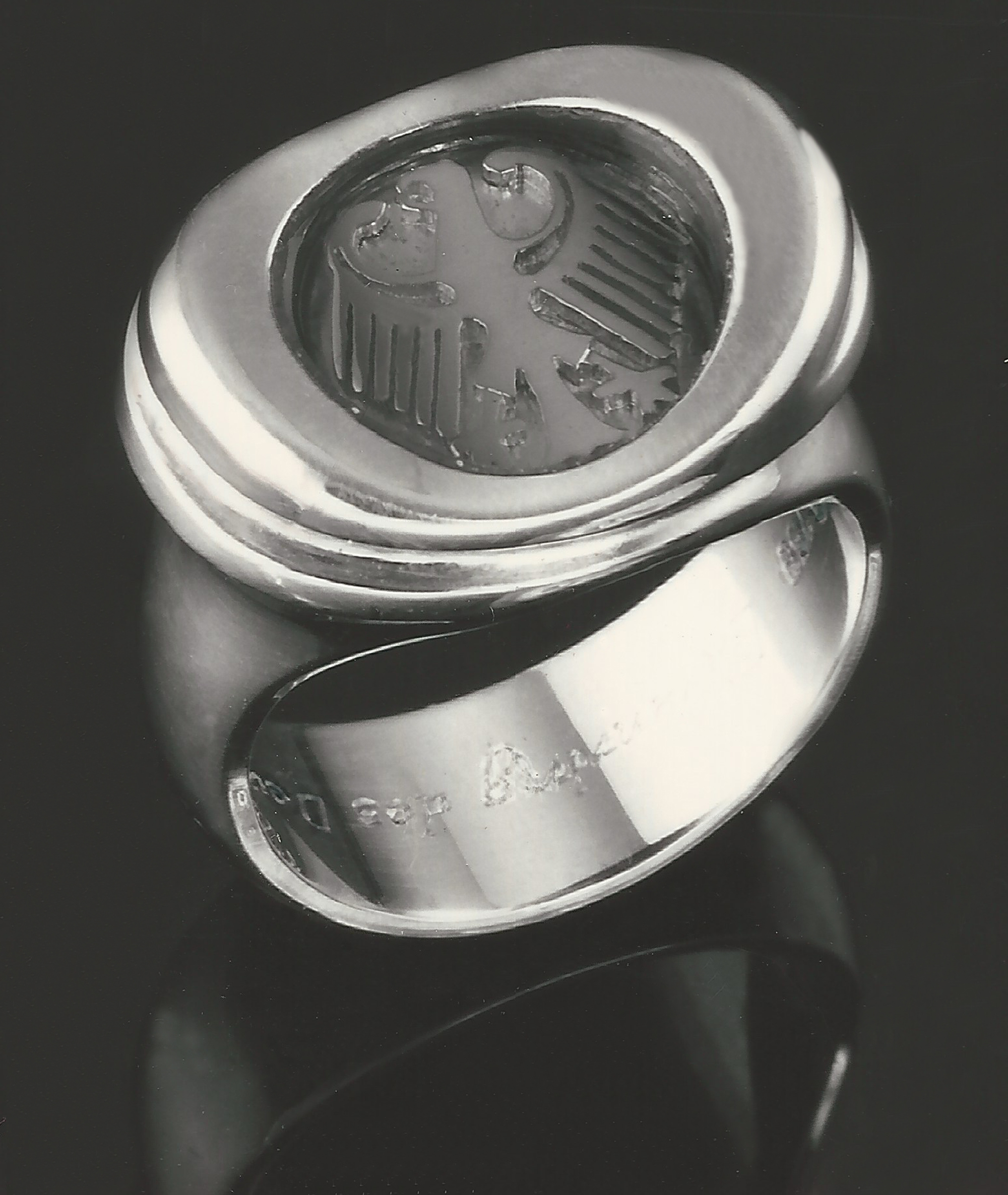 Der von Goldschmiedemeister Werner Fischer im Jahre 1982 angefertigte Ehrenring des Deutschen Handwerks. Er wurde dem damaligen Bundeskanzler Helmut Schmidt verliehen.